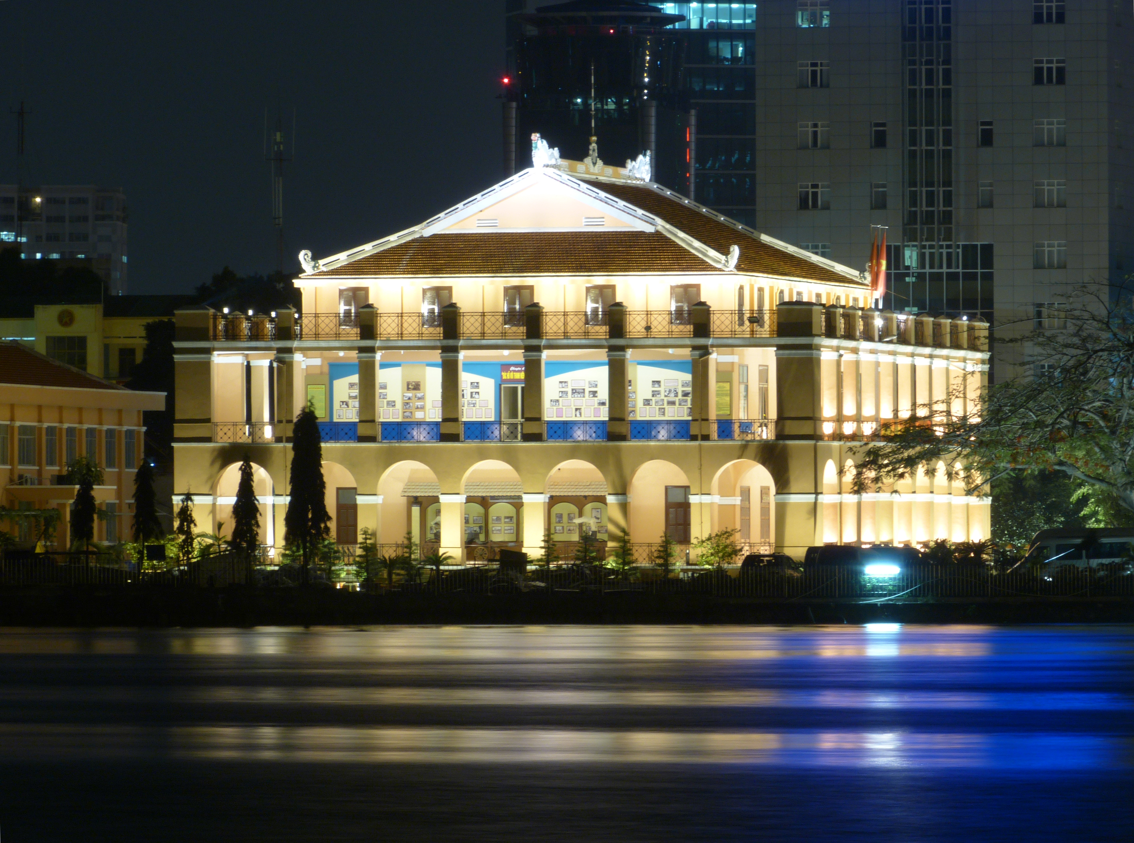 Bến Nhà Rồng vào buổi tối, tháng 1 năm 2013